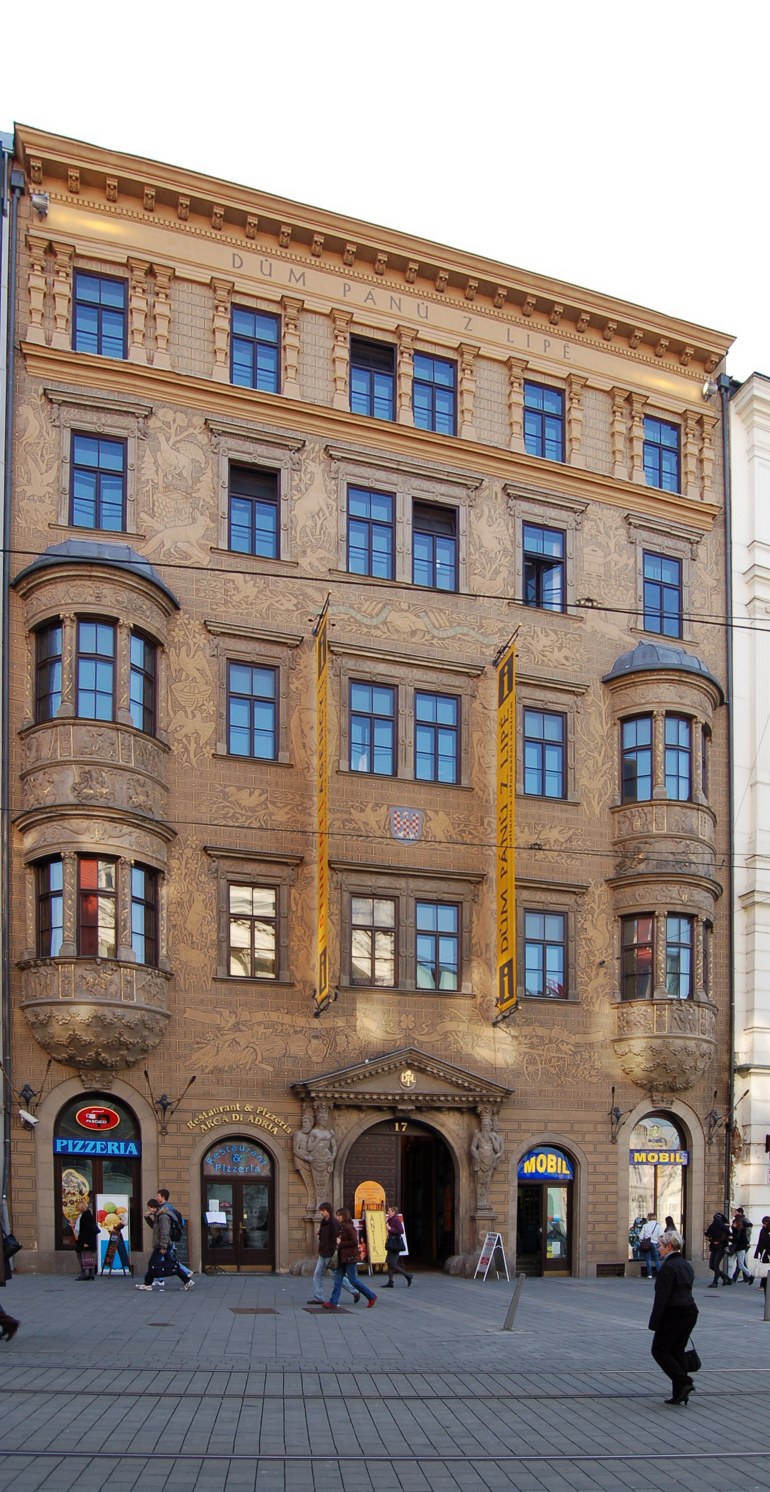 Palác Schwanzův, dům Pánů z Lipé (Brno), Brno - město, nám. Svobody 86/17, Brno